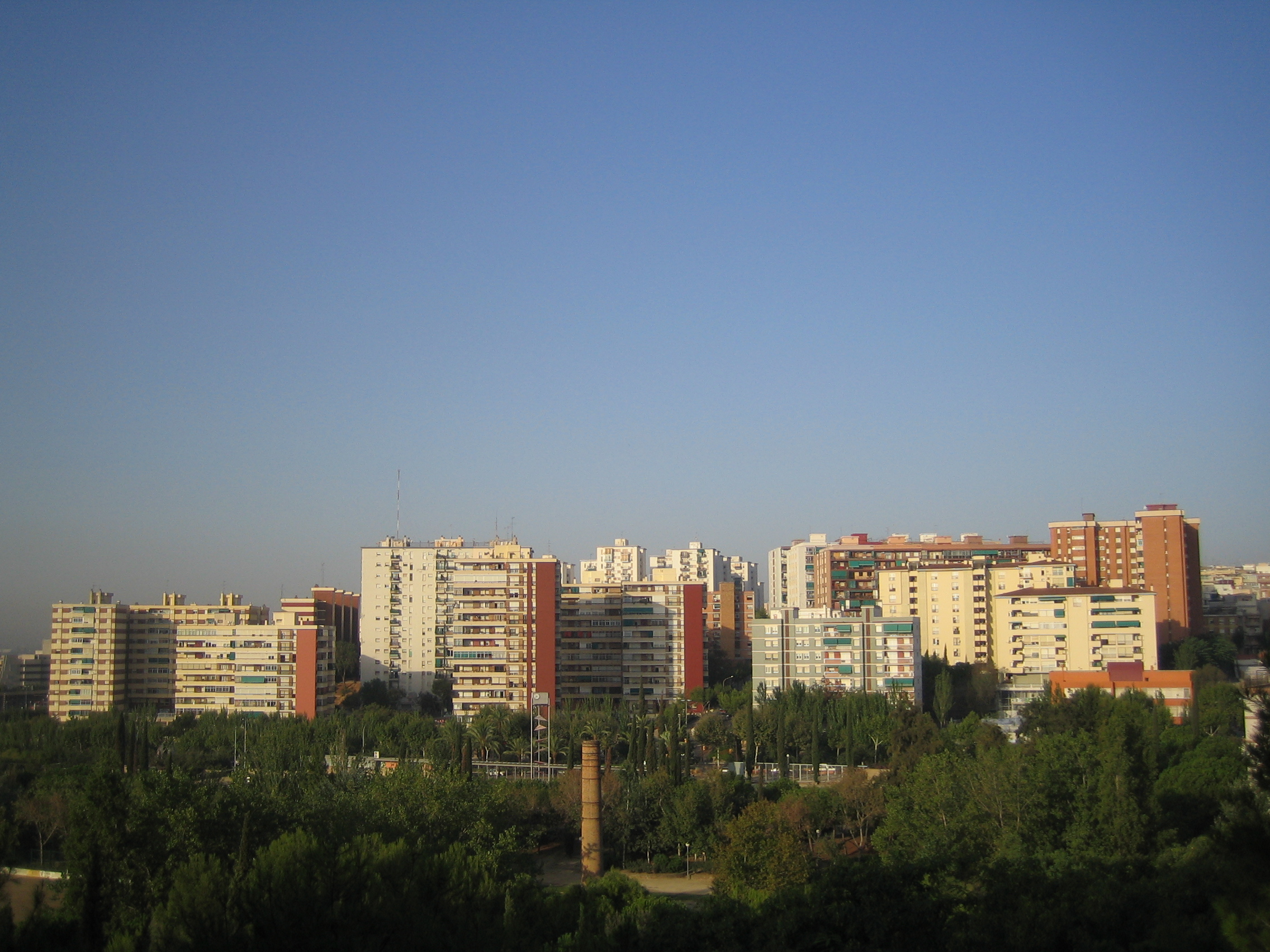 Foto hecha por mi desde la calle teide hacia el sur, el viernes 16 de Septiembre del 2005 a las 07:57 de la mañana. Con la cámara CANON ixus 40